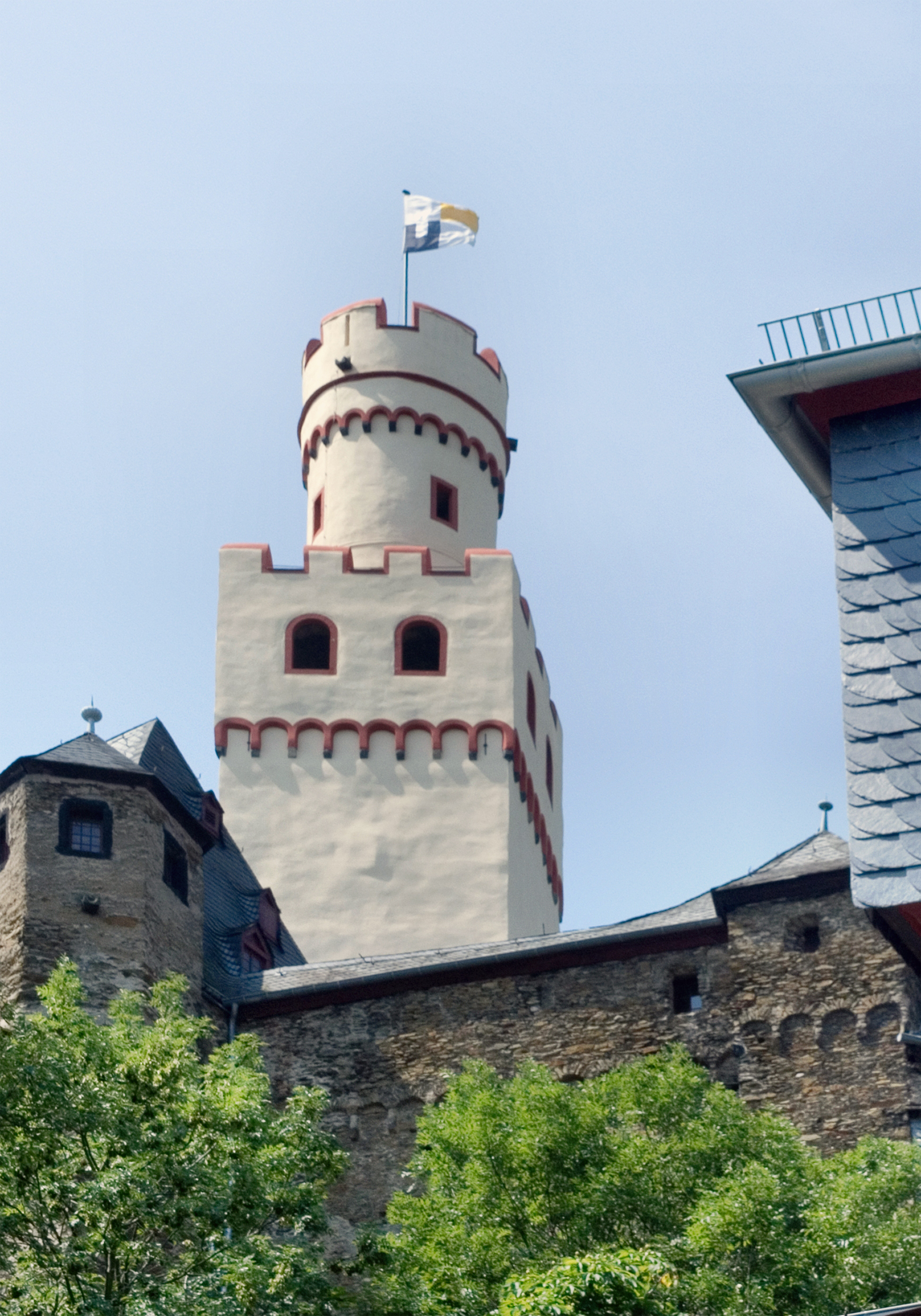 Bergfried der Marksburg